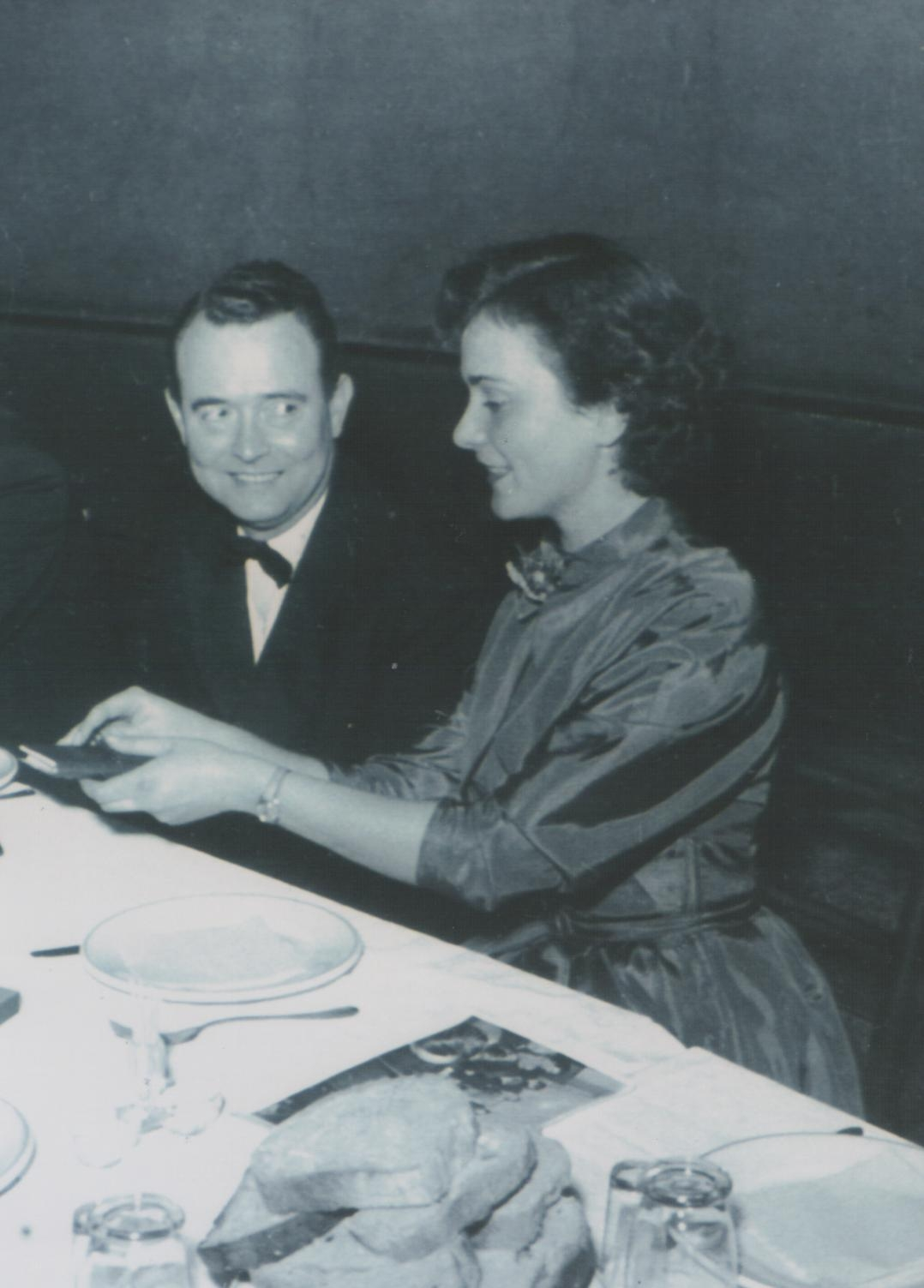 Stevan Kragujevic: Reditelj filma Vesna Frantisek Cap i glavna glumica Metka Gabrijelcic, premijera filma u Beogradu, 1953.